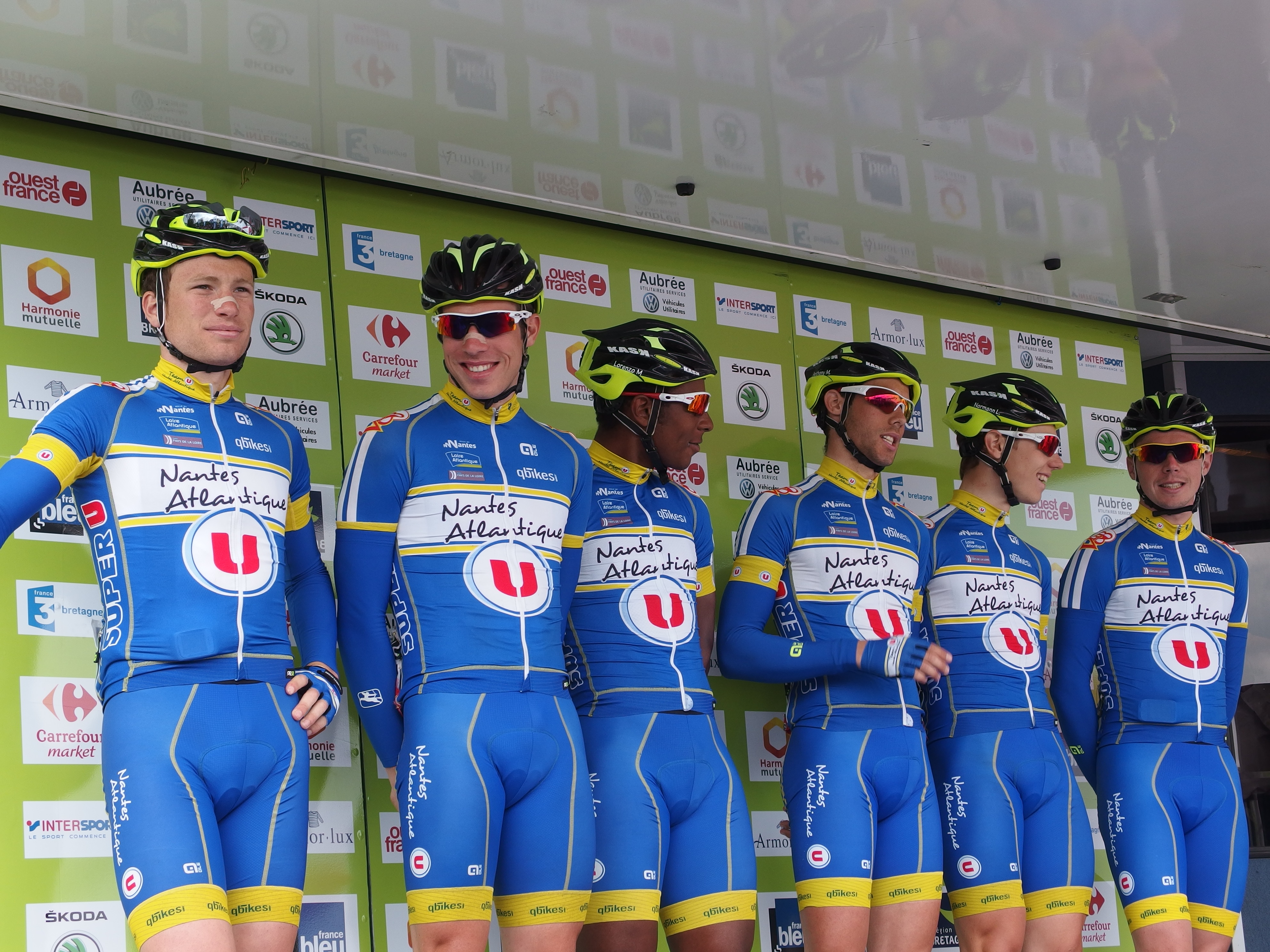 Tour de Bretagne 2014 - Présentation des équipes au départ de la sixième étape à Radenac - Équipe UC Nantes Atlantique Depicted people: Vincent Colas, Mathieu Cloarec, Lorrenzo Manzin, Anthony Mira, Fabien Schmidt and Normann Latouche